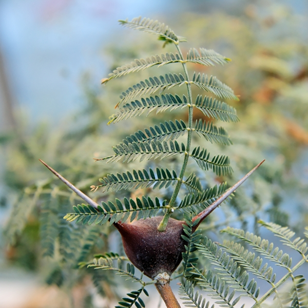 Okänd växt